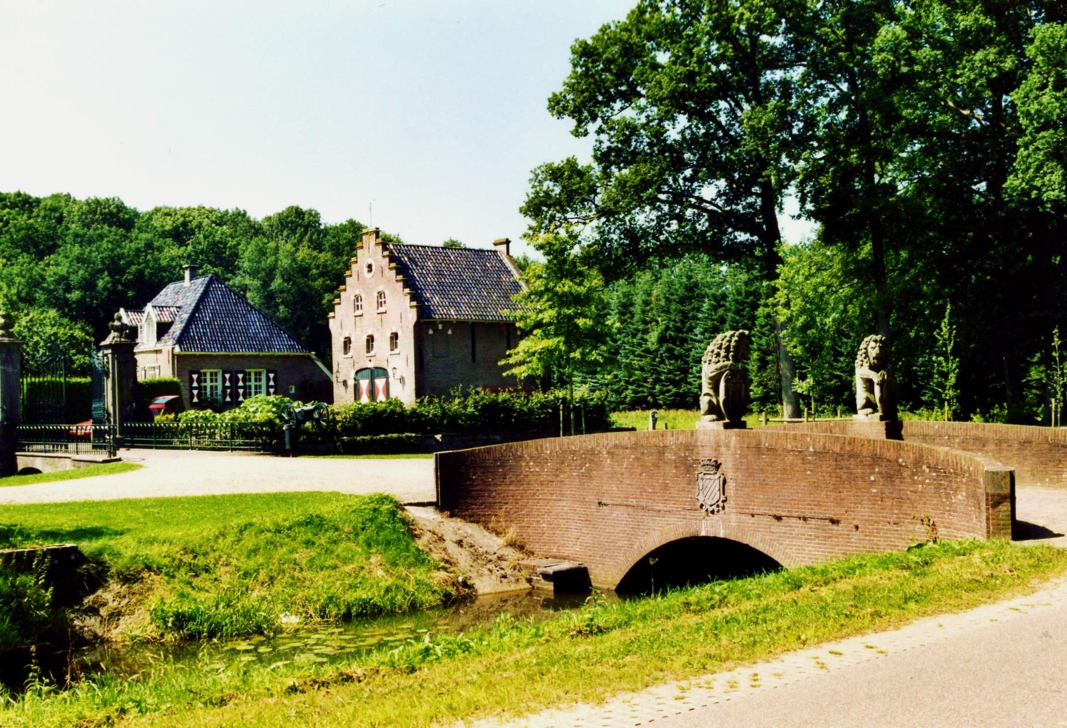 De bruggen van het verdwenen huis De Gelder te Wijhe.